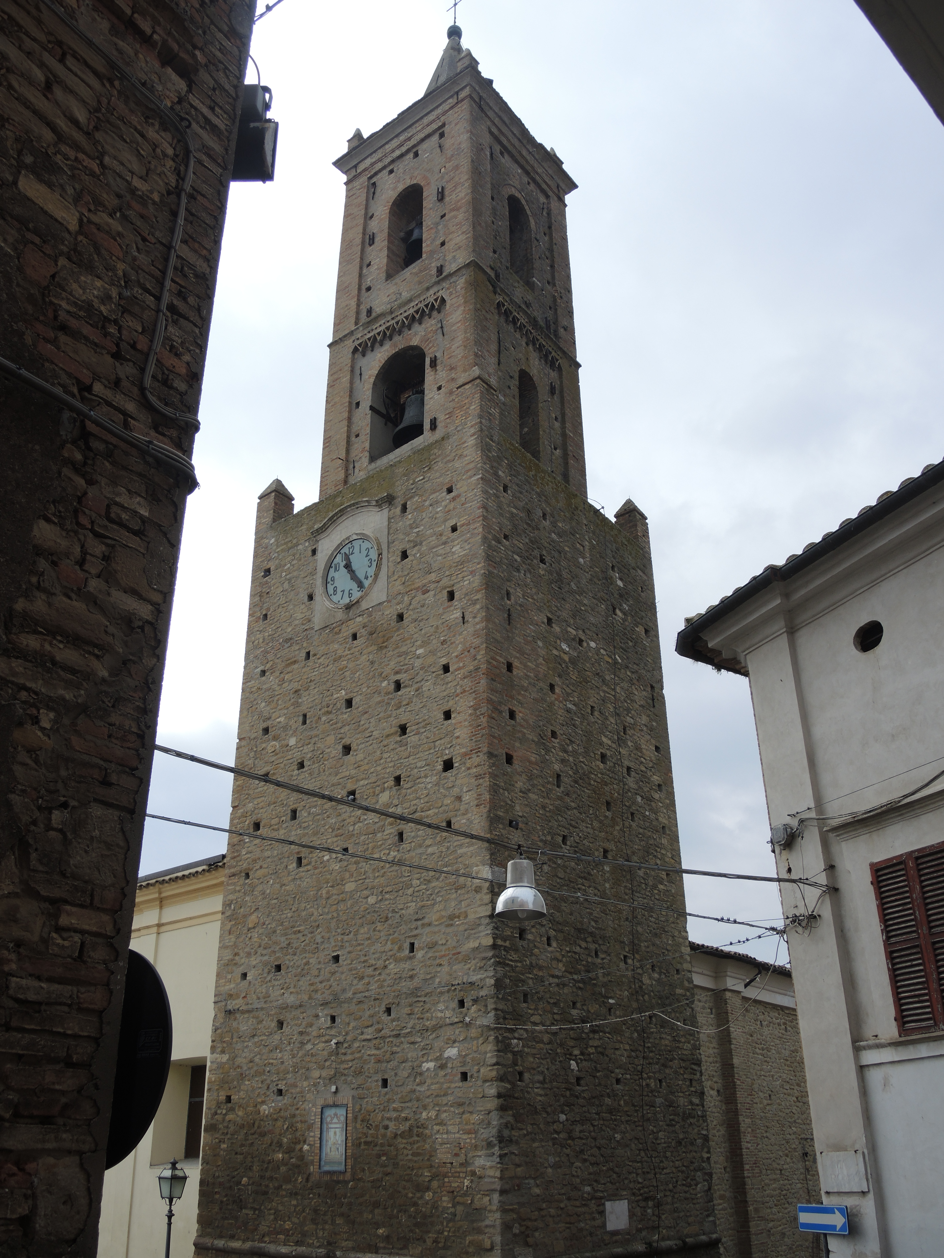 Cellino Attanasio: Chiesa di Santa Maria la Nova